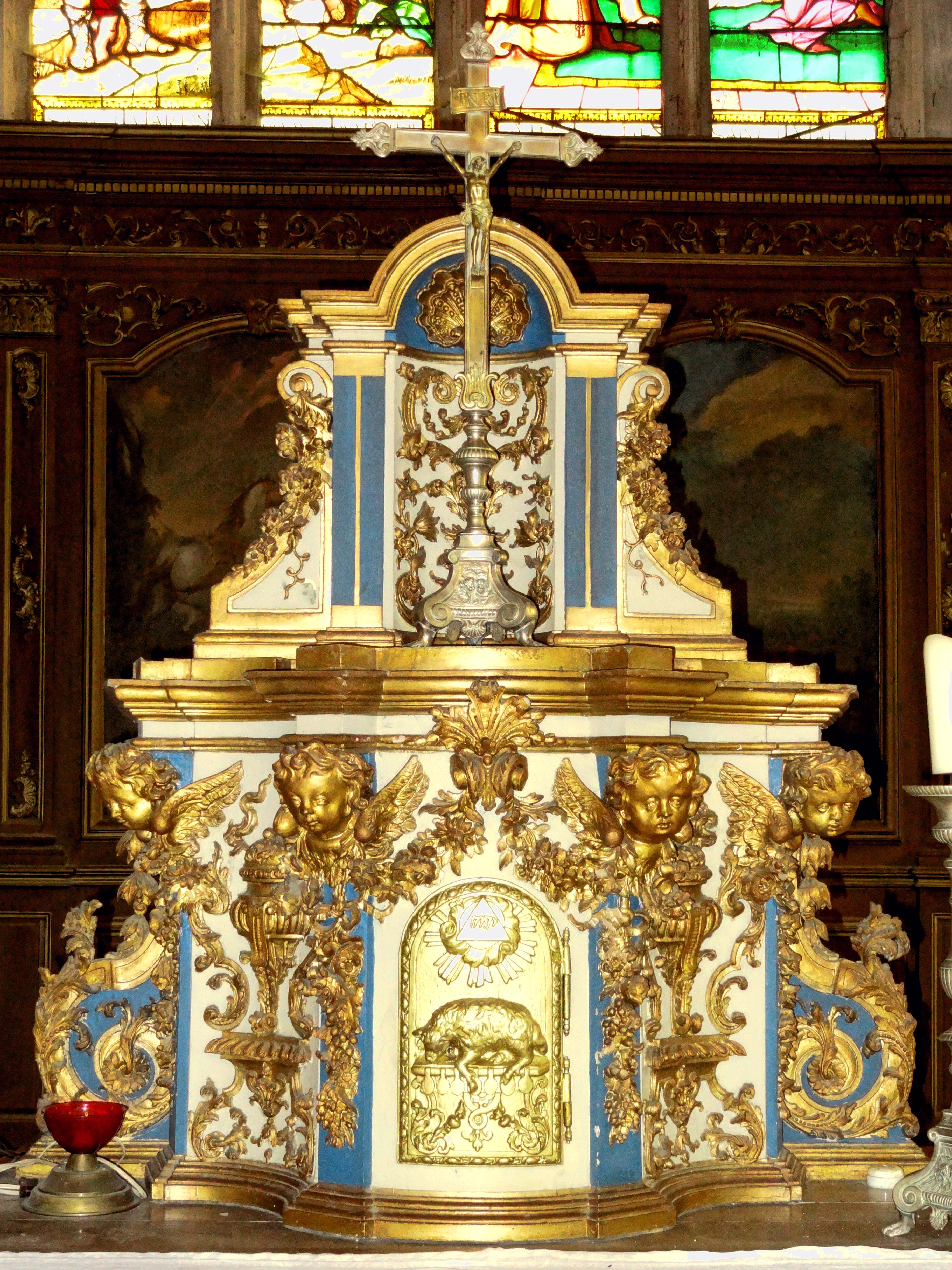 Mobilier de l'église - voir titre.